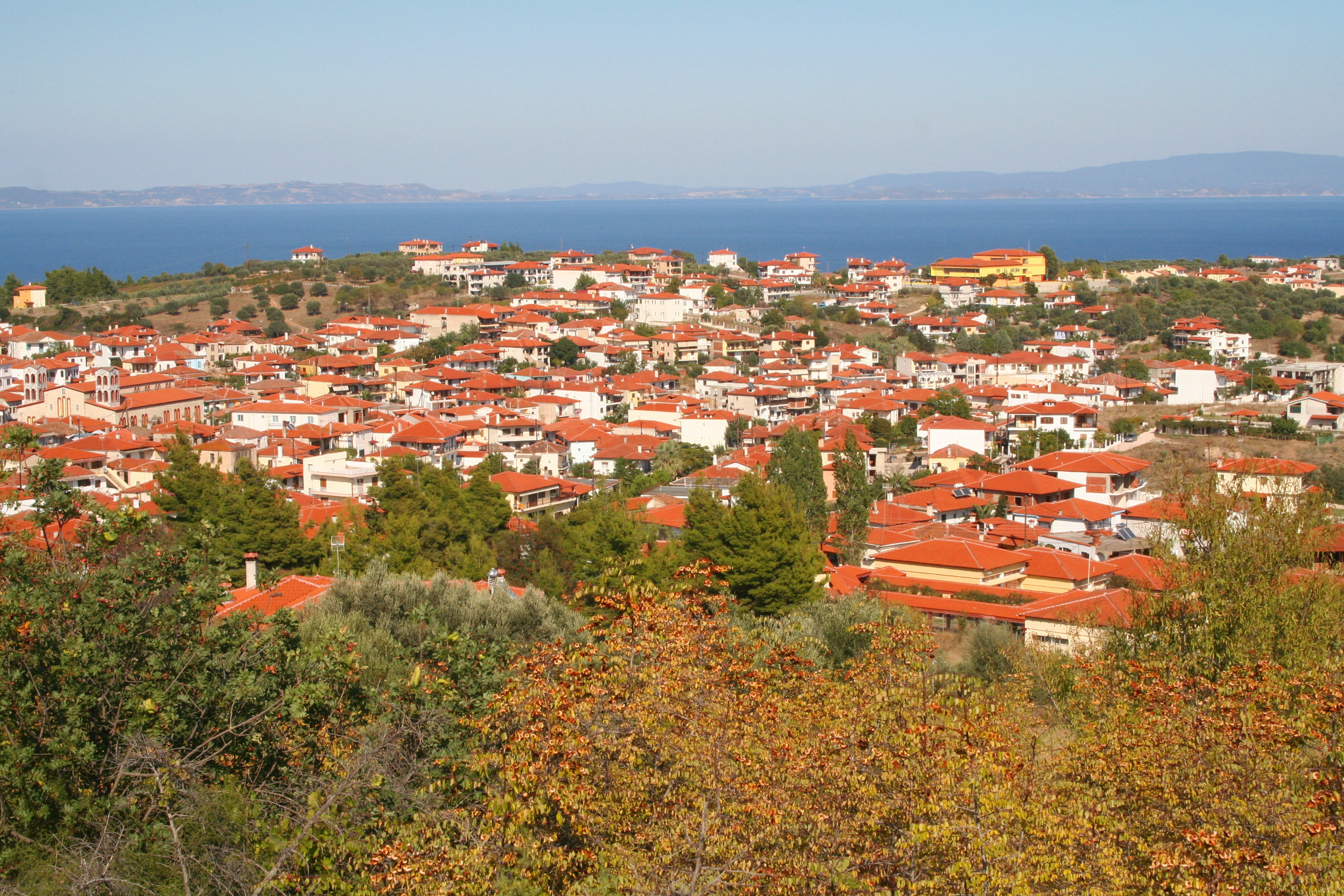 Blick aus südwestlicher Richtung auf Ágios Nikólaos.